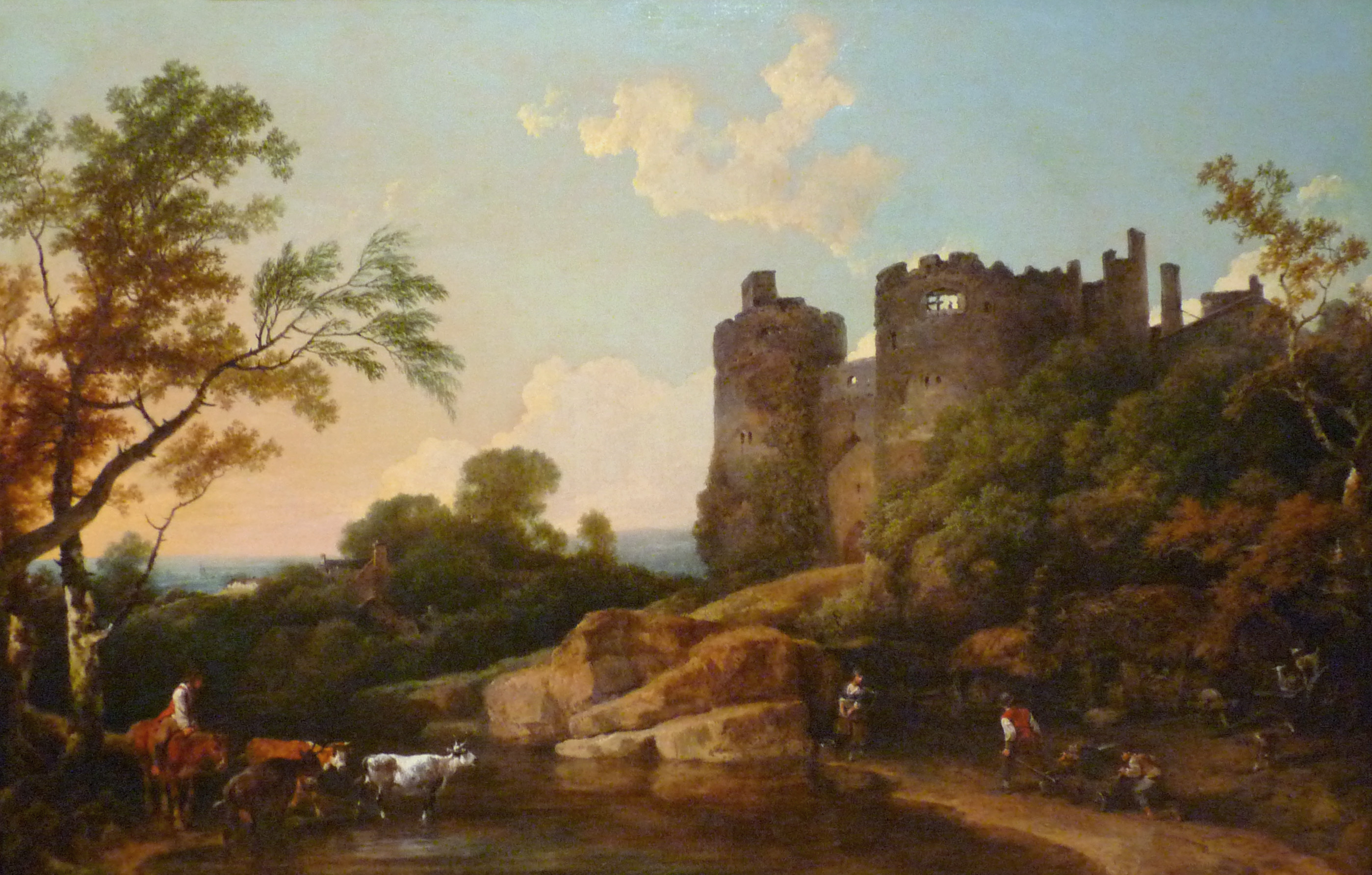 Philippe-Jacques de Loutherbourg, Paysage avec le château de Harlech, collection particulière (Royaume-Uni)